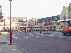 De dorpskern van Rockanje, eigen werk